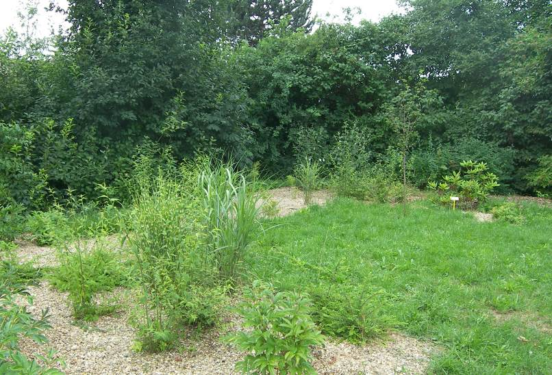 Živý plot volně rostoucí, šeřík, pámelník